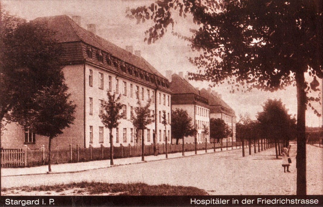 Stargard i. P., 1900-1910 r. Budynki szpitalne przy ulicy Warszawskiej, numery 27, 26 i 25.